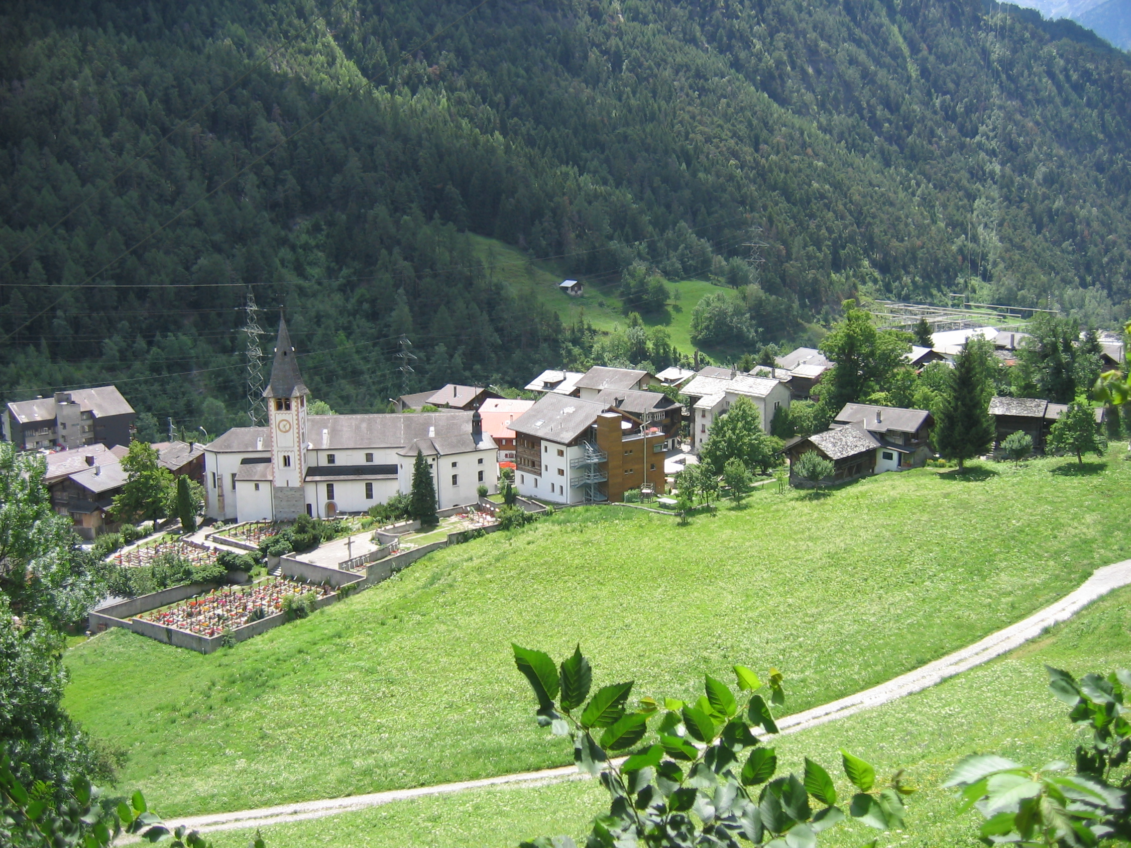 Mörel mit Kirche und Kirchhof, Schweiz